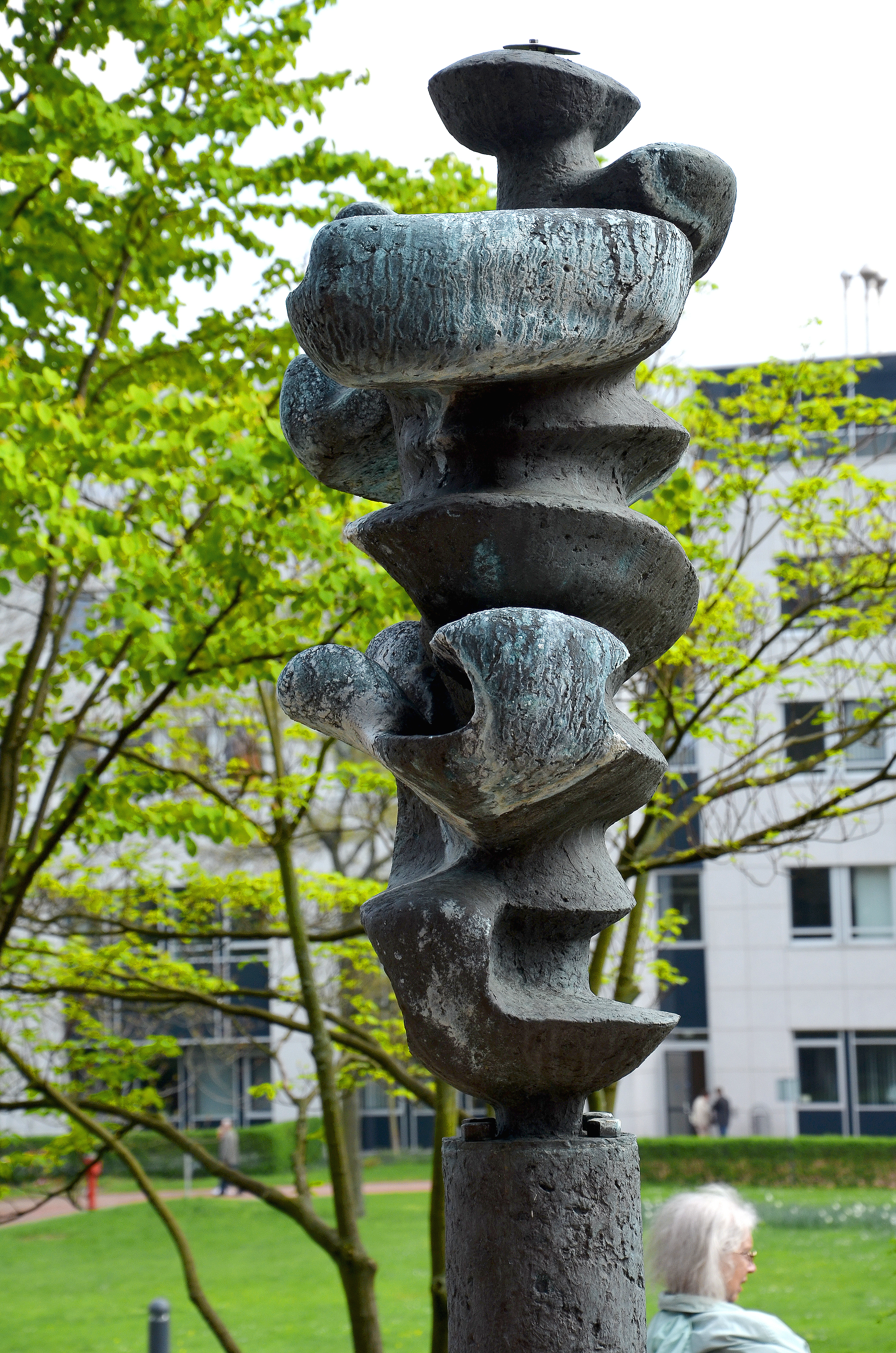 Die Skulptur Nereide, nach der griechischen Mythologie eine der im Meer lebenden Nymphen, die die Schiffbrüchigen beschützen, schuf der Bildhauer Kurt Lehmann im Jahr 1978 laut einer zu Füßen der Plastik angeschraubten Informationstafel. Diese Nereide wurde - ohne ihr einen bestimmteren Namen zuzuordnen - im Park der Medizinischen Hochschule Hannover (MHH) installiert ...